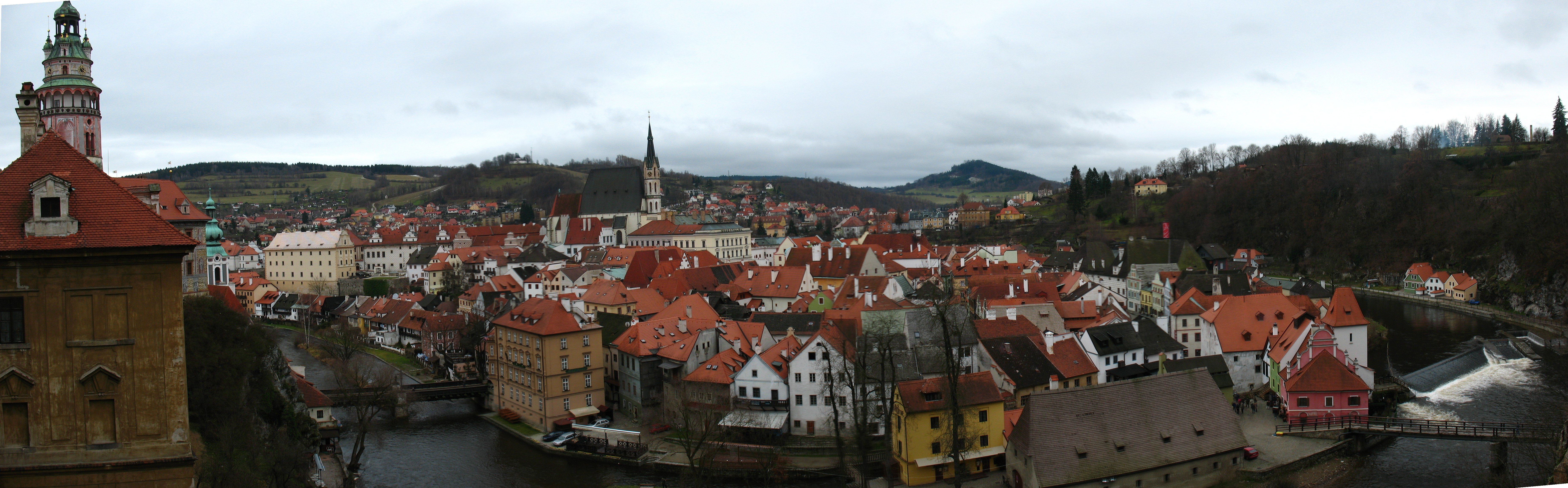 Pano Cesky Kumlov en la República Checa